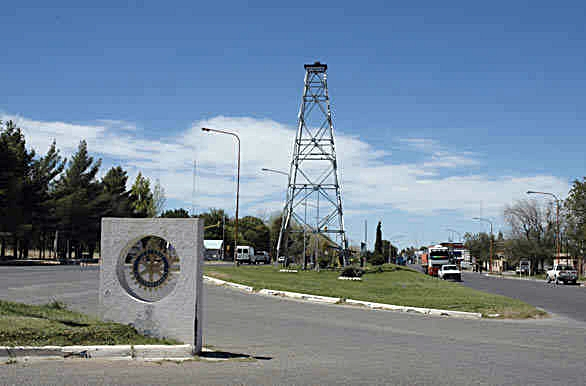 monumenots torre